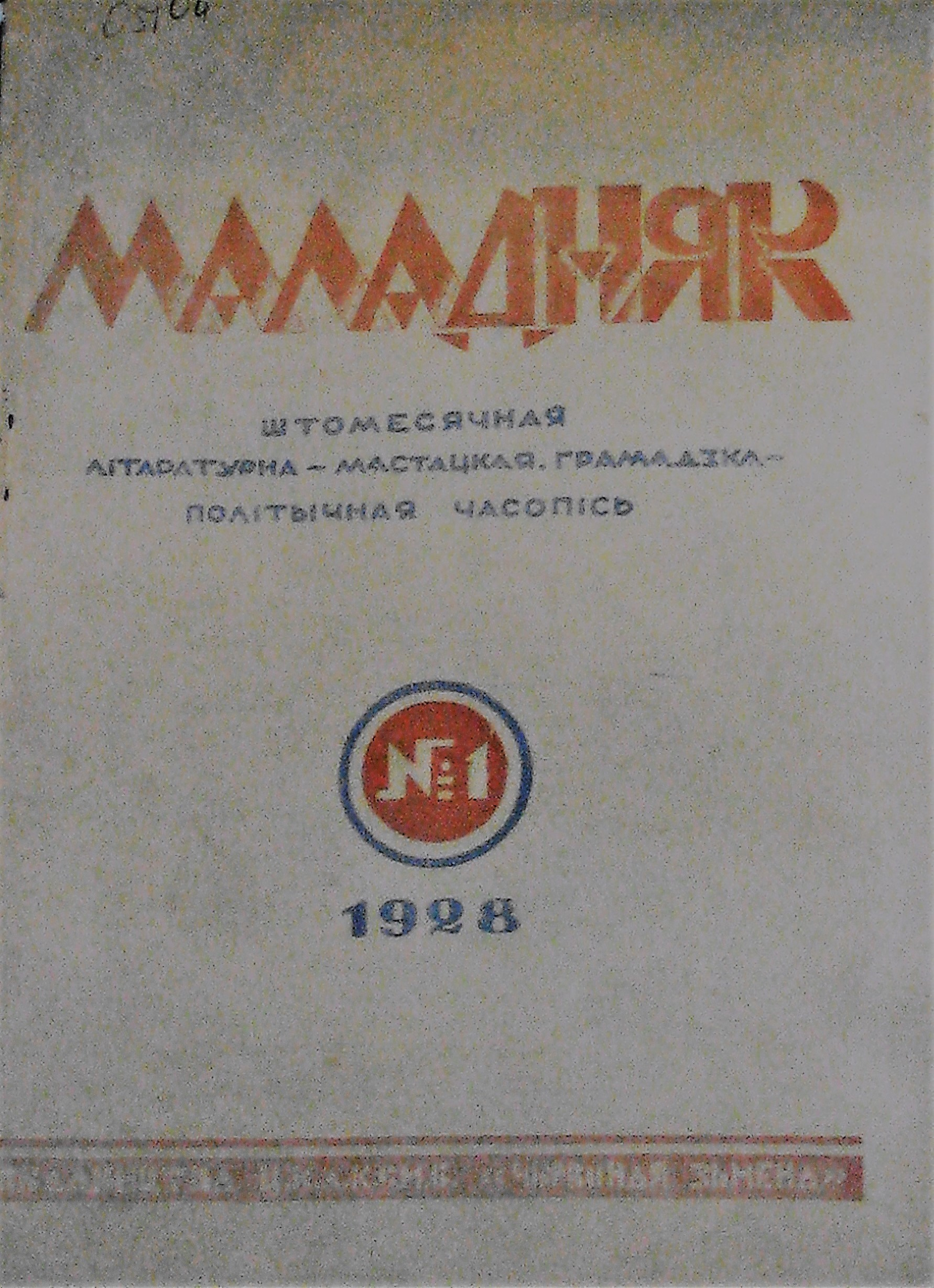 Вокладка часопіса «Маладняк», 1928, №1.